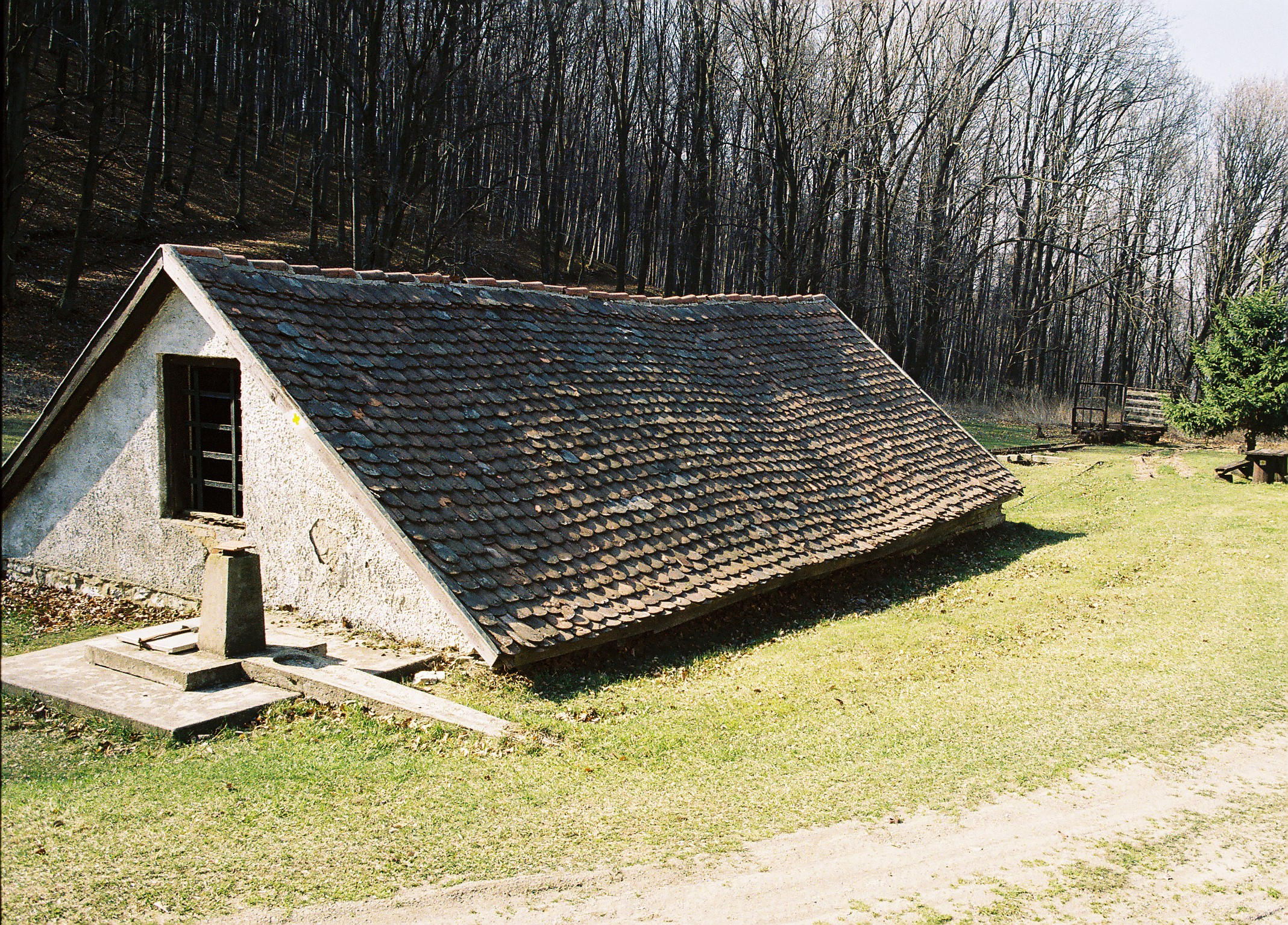 Bergstation der Schiefen Ebene der Szalajkabahn in Ungarn